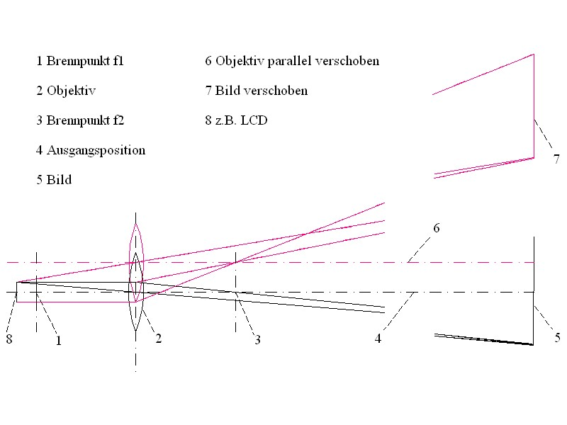 Video Projektor, lens shift, Objektiv wird parallel zur Bildebene veschoben. Stahlengang zur Abbildung der Bildpunkte